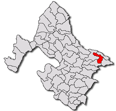 Categorie:Hărţi ale judeţului Mehedinţi